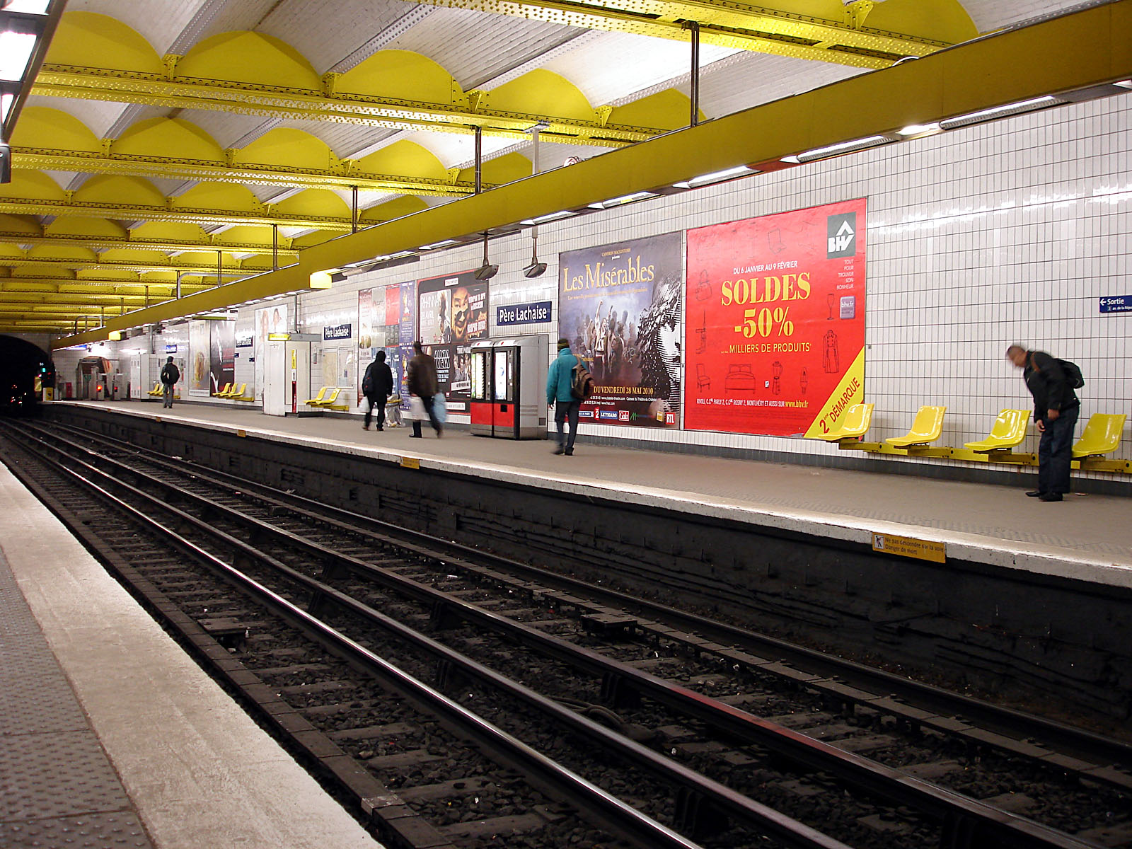 La station Père Lachaise de la ligne 3 du métro de Paris, France.